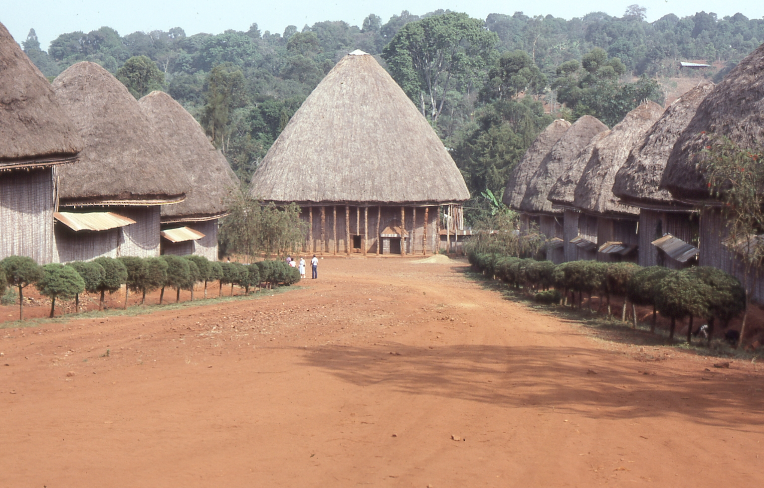 Description Chefferie Bandjoun, photo prise en février 1982 Date13 February 1982Sourceimages personnellesAuthorChristian_Muir Chefferie Bandjoun, photo prise en février 1982